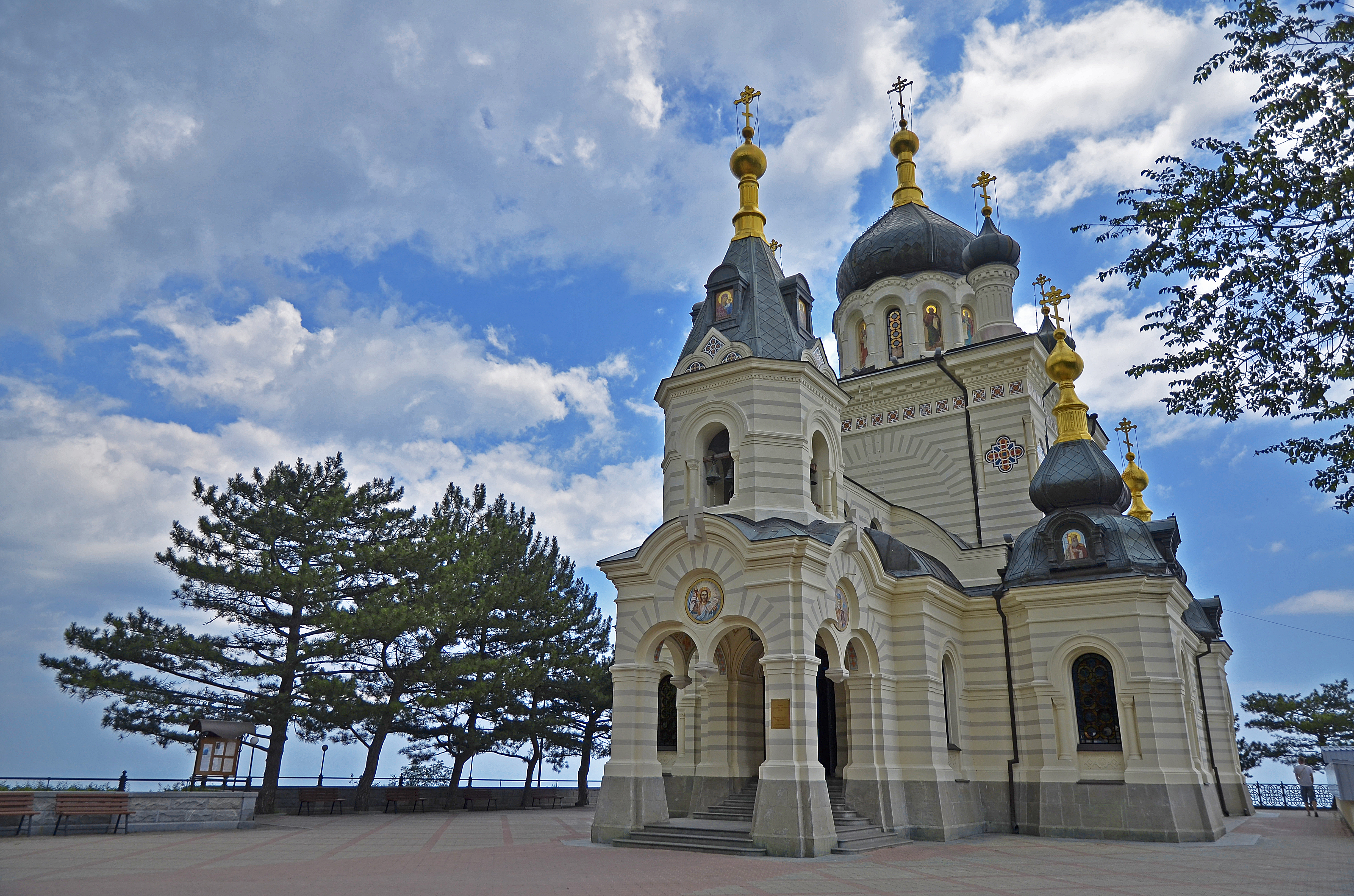 Подробнее здесь